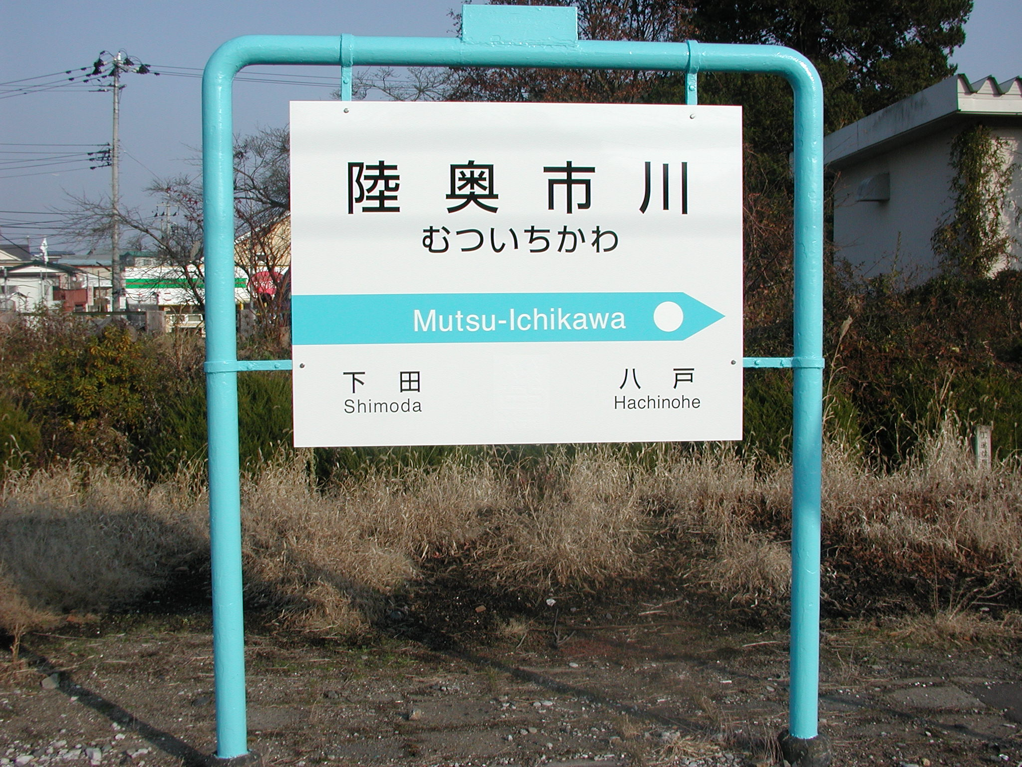 青い森鉄道への移管を目前に、骨組み枠塗装変更・駅名板が入れ替えられた、JR陸奥市川駅の駅名標。